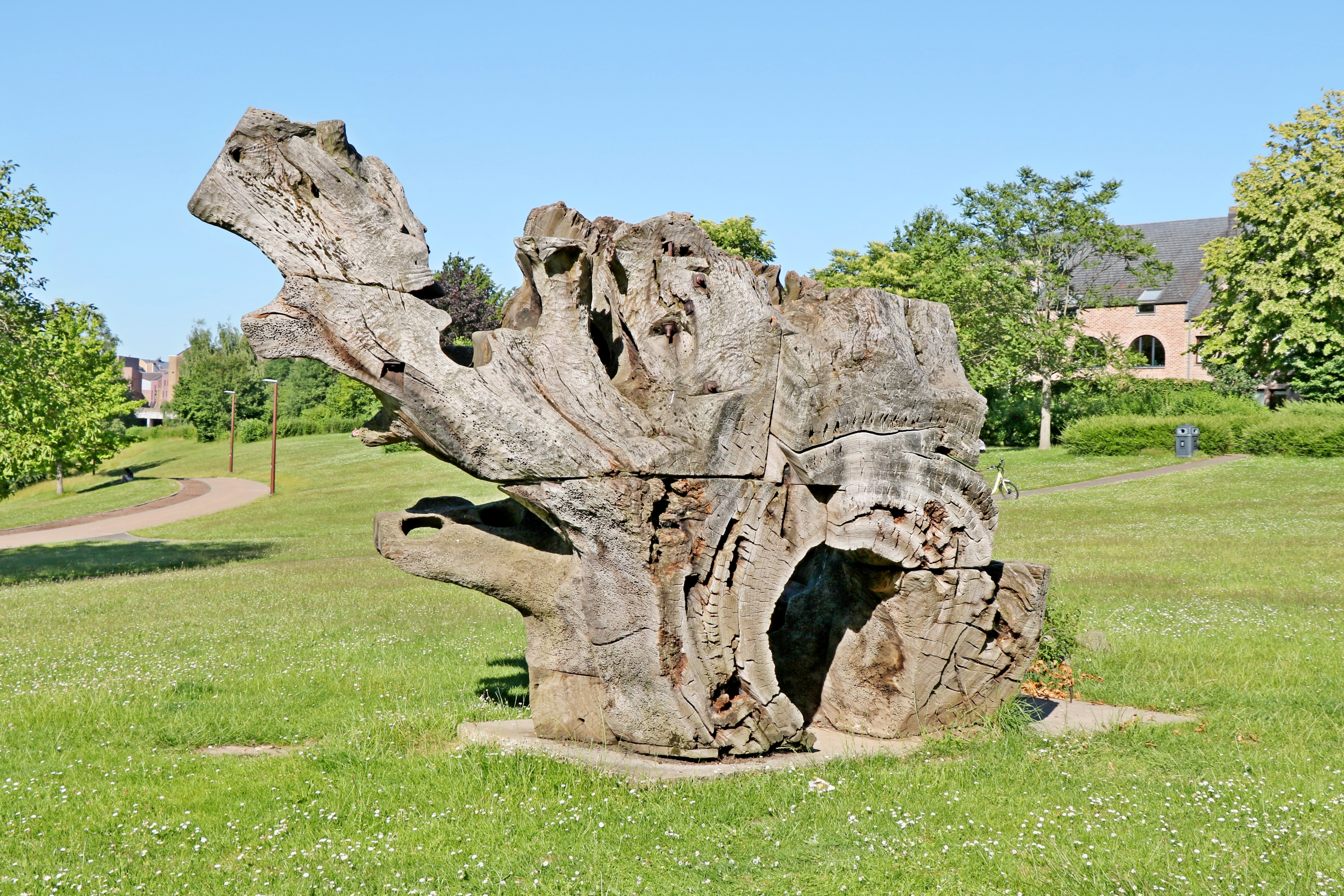 Belgique - Louvain-la-Neuve - Racine de Camphrier (pourtour du lac de Louvain-la-Neuve - Sofu Teshigahara 1993)